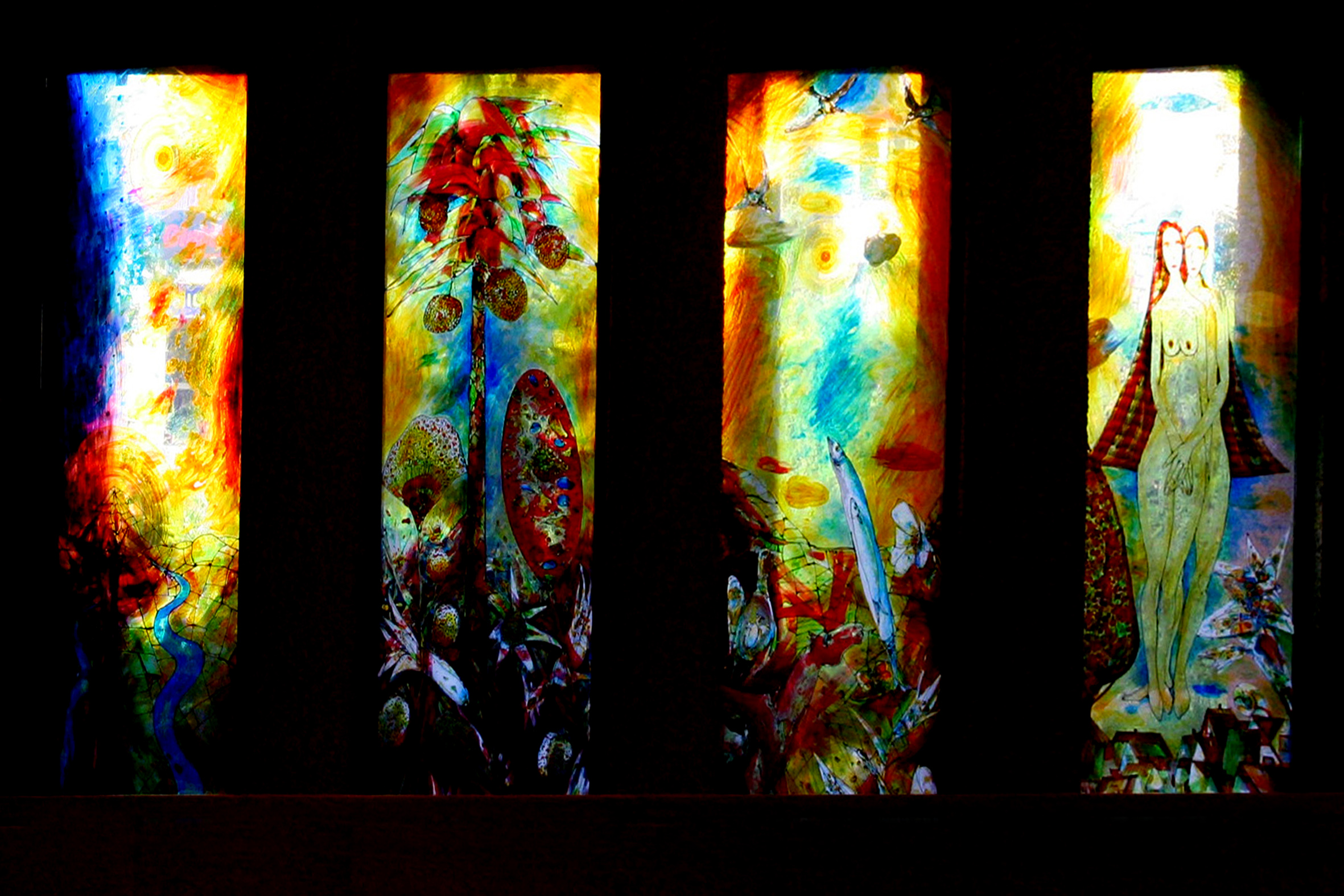 Glasfenster des Künstlers Jan January Janczak in der römisch-katholischen St. Annakirche Opfikon-Glattbrugg